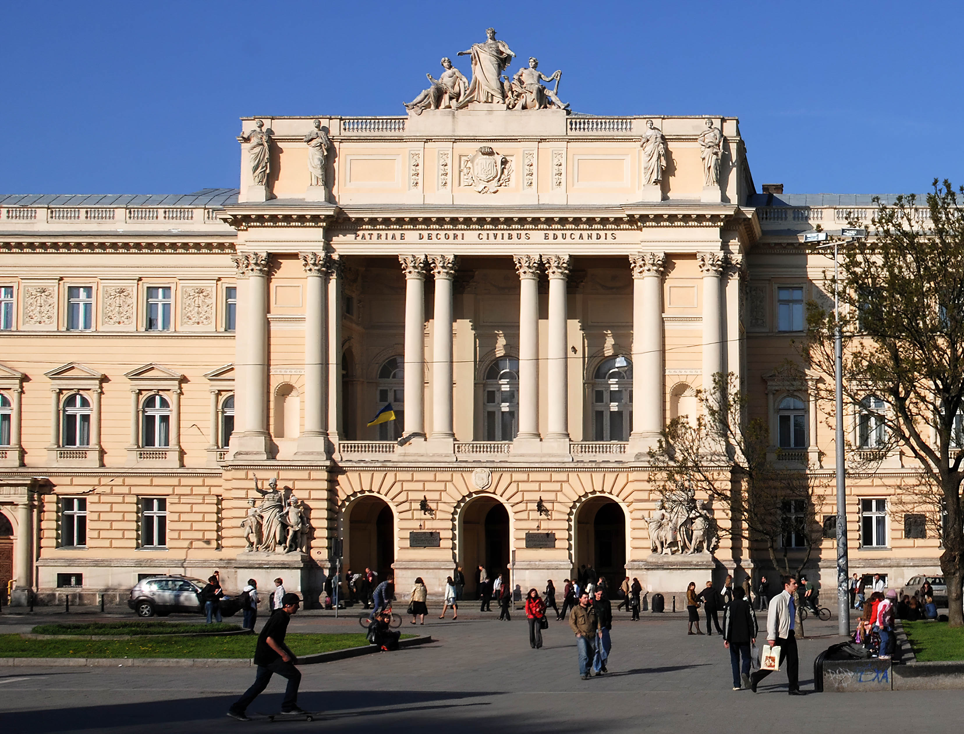 Головний навчальний корпус університету, в якому працювали видатні українські математики Зарицький М., Левицький В., Чайковський М. і вчені україністи Головацький Я., Огоновський О., Возняк М., Сімович В., Ковалик І. (Будинок галицького сейму), Львів, Університетська, 1